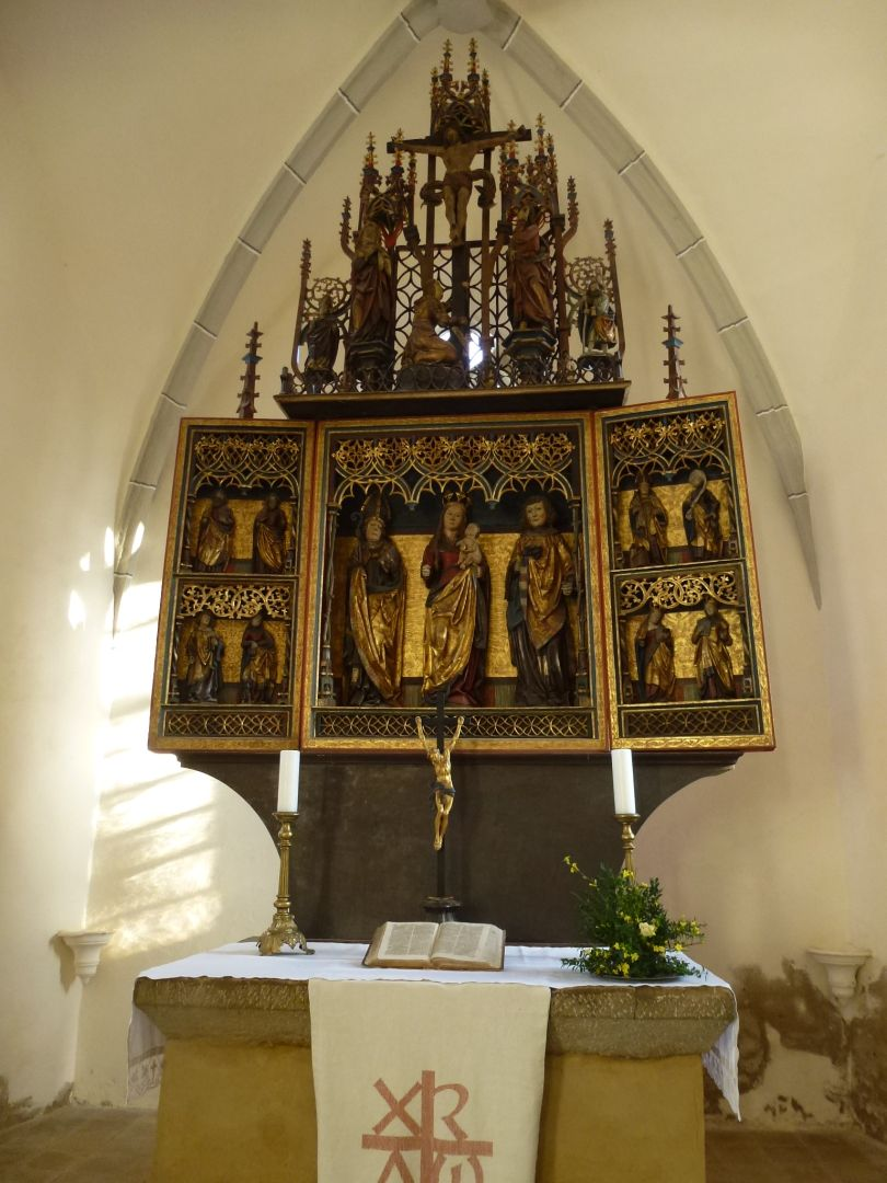 Flügelaltar in Holleben